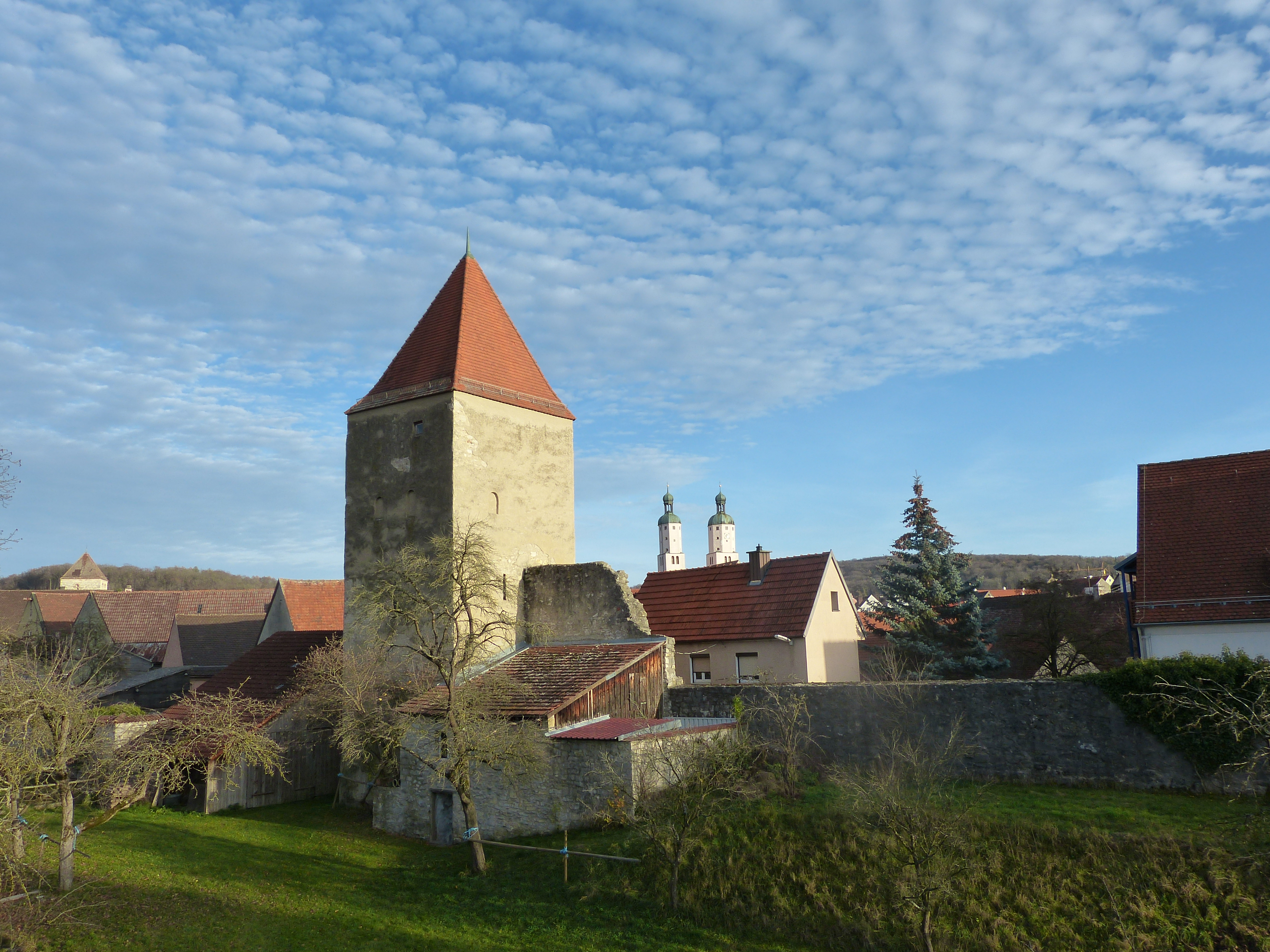 Baronturm mit Überresten der Stadtmauer von Wemding